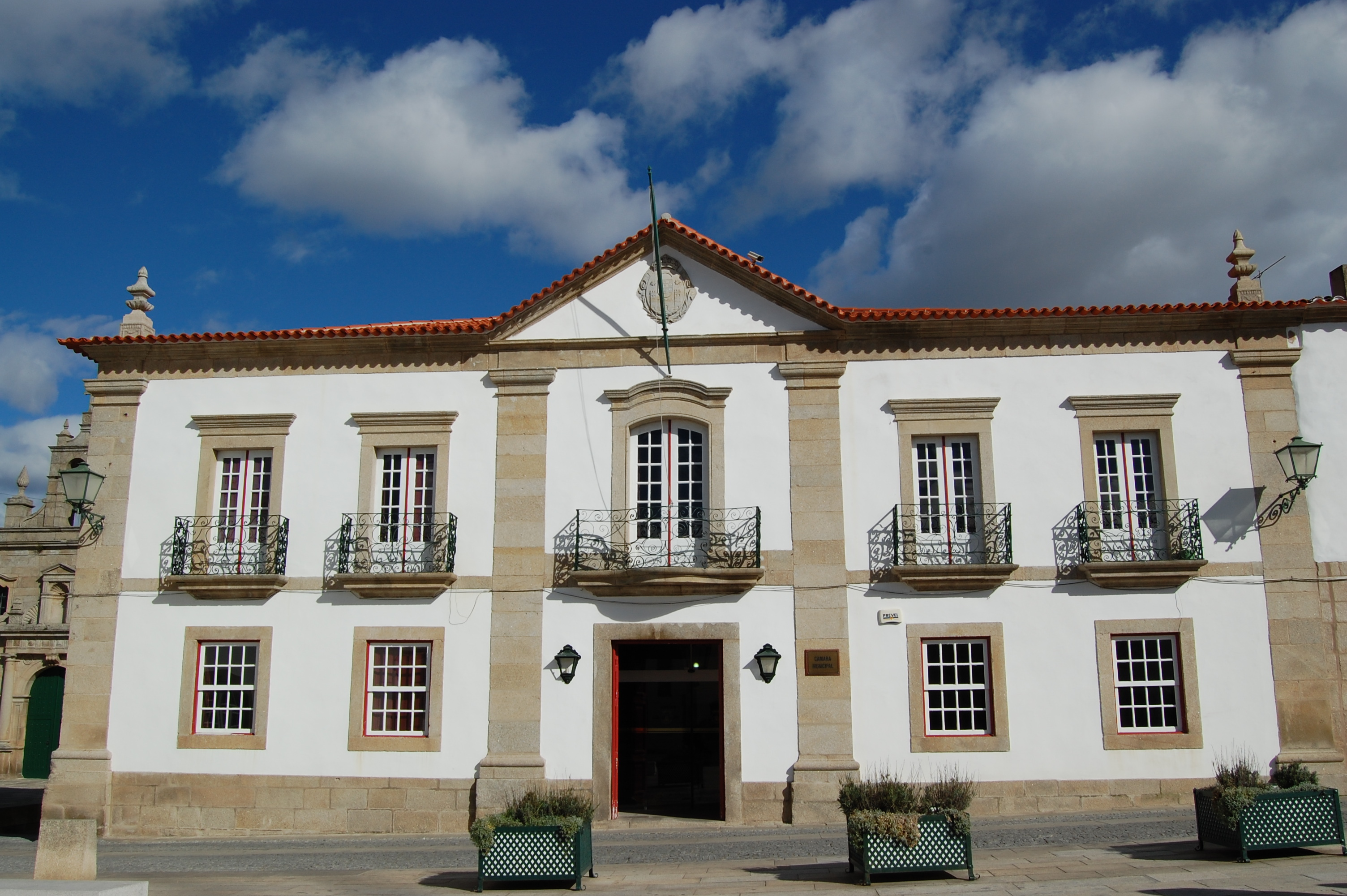 Miranda do Douro, Portugal.